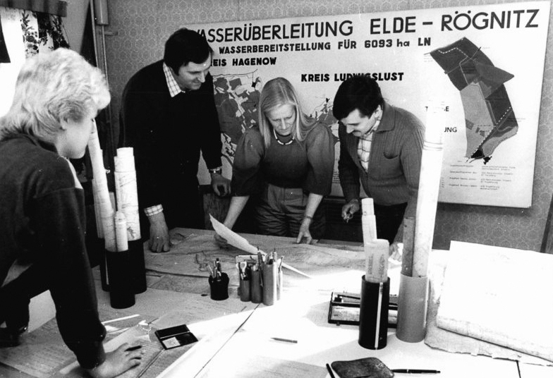 Schwerin, Planung von Meliorationen ADN-ZB Pätzold-24.3.86 Schwerin: Für künftig höhere Ernteerträge und saftigere Weiden sorgen Mitarbeiter in den Projektierungsbüros des VEB Meliorationsbau Schwerin. Hier entstehen Be- und Entwässerungsprojekte für den mecklenburgischen Bezirk. Als jüngstes Vorhaben steht die Wasserüberleitung von der Elde in die Rögnitz und damit die Melioration von über 6000 ha landwirtschaftlicher Fläche kurz vor dem Abschluß. Zur Rationalisierung der Projektierungsarbeiten werden auch alte Karten und Lagepläne aus den Beständen des Schweriner Staatsarchives für aktuelle Aufgaben genutzt. siehe auch ADN Bezirkskorrespondenz vom 21.3.86